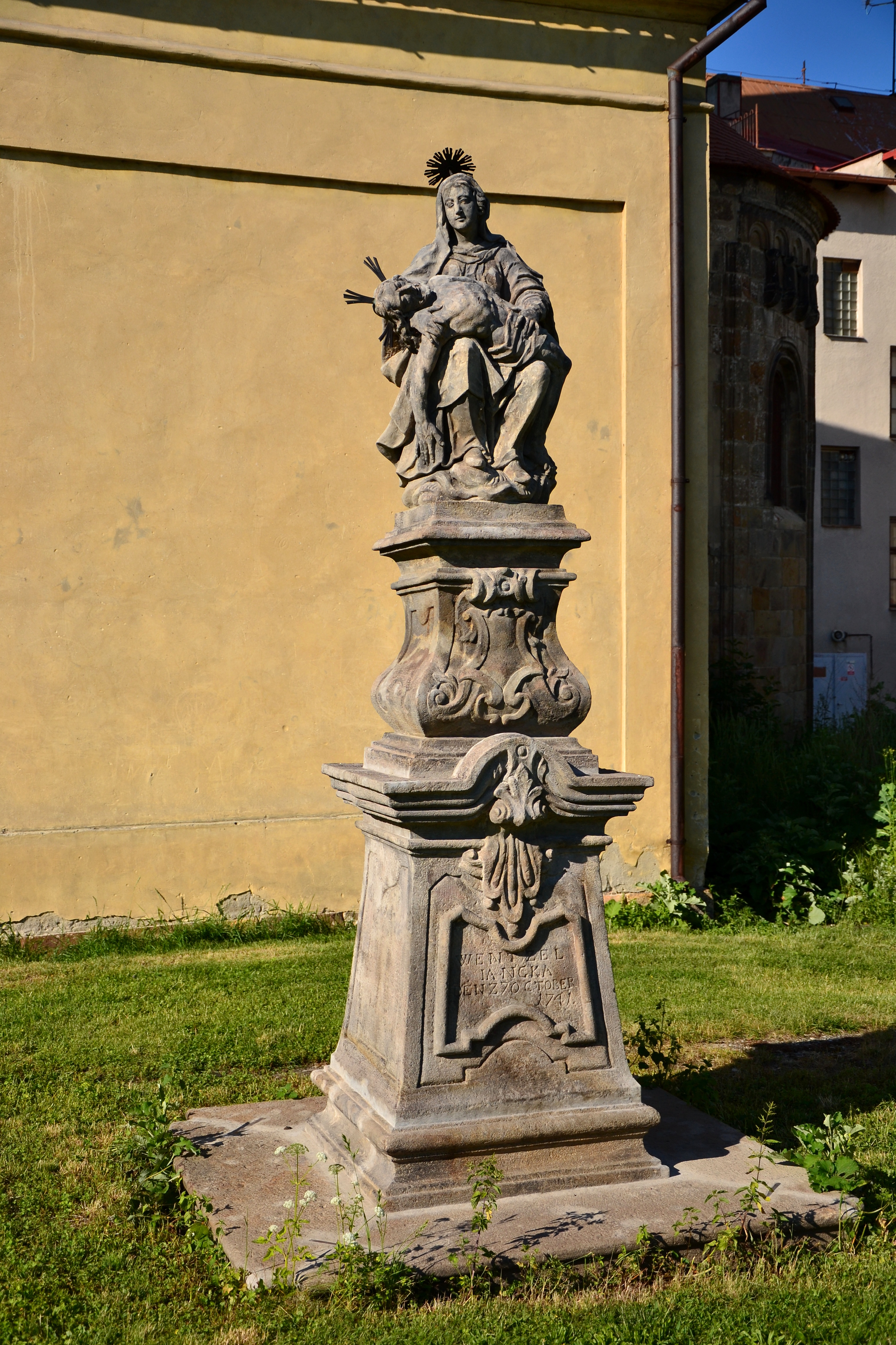 Socha Piety (Údlice), u kostela, přemístěno z Milžan, Údlice